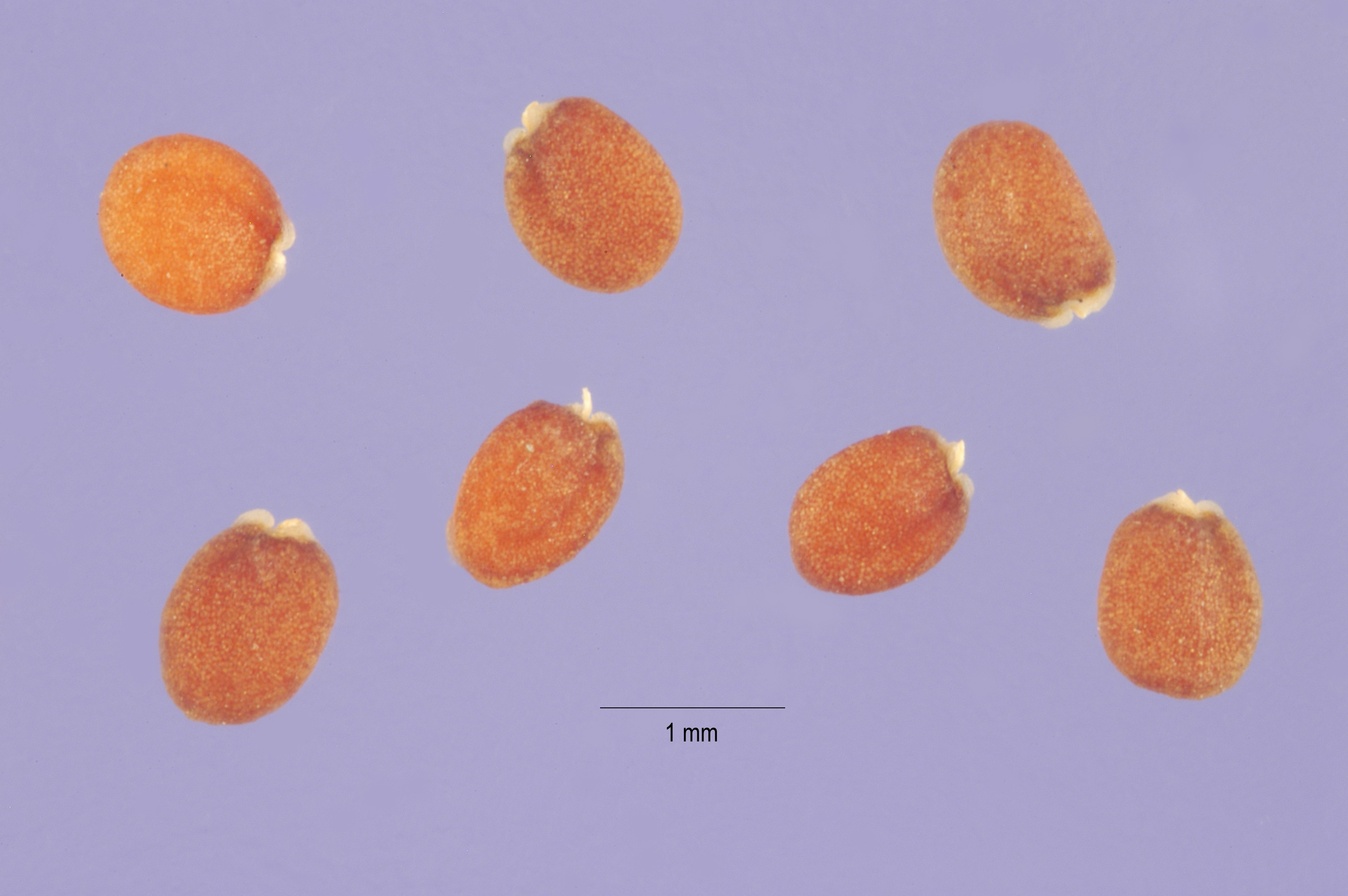 Teesdalia nudicaulis seeds